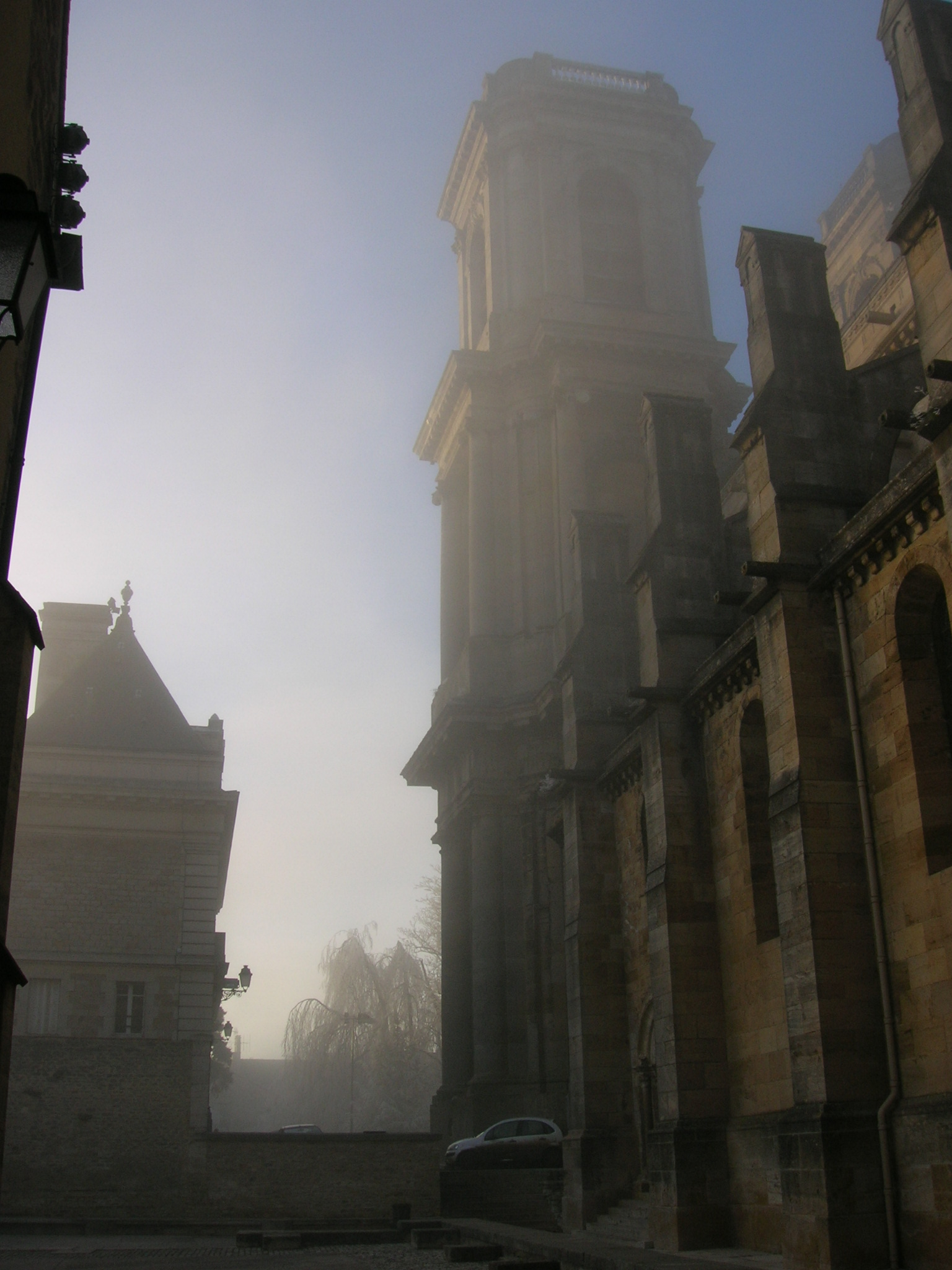 La cathédrale de Langres vue du cloitre